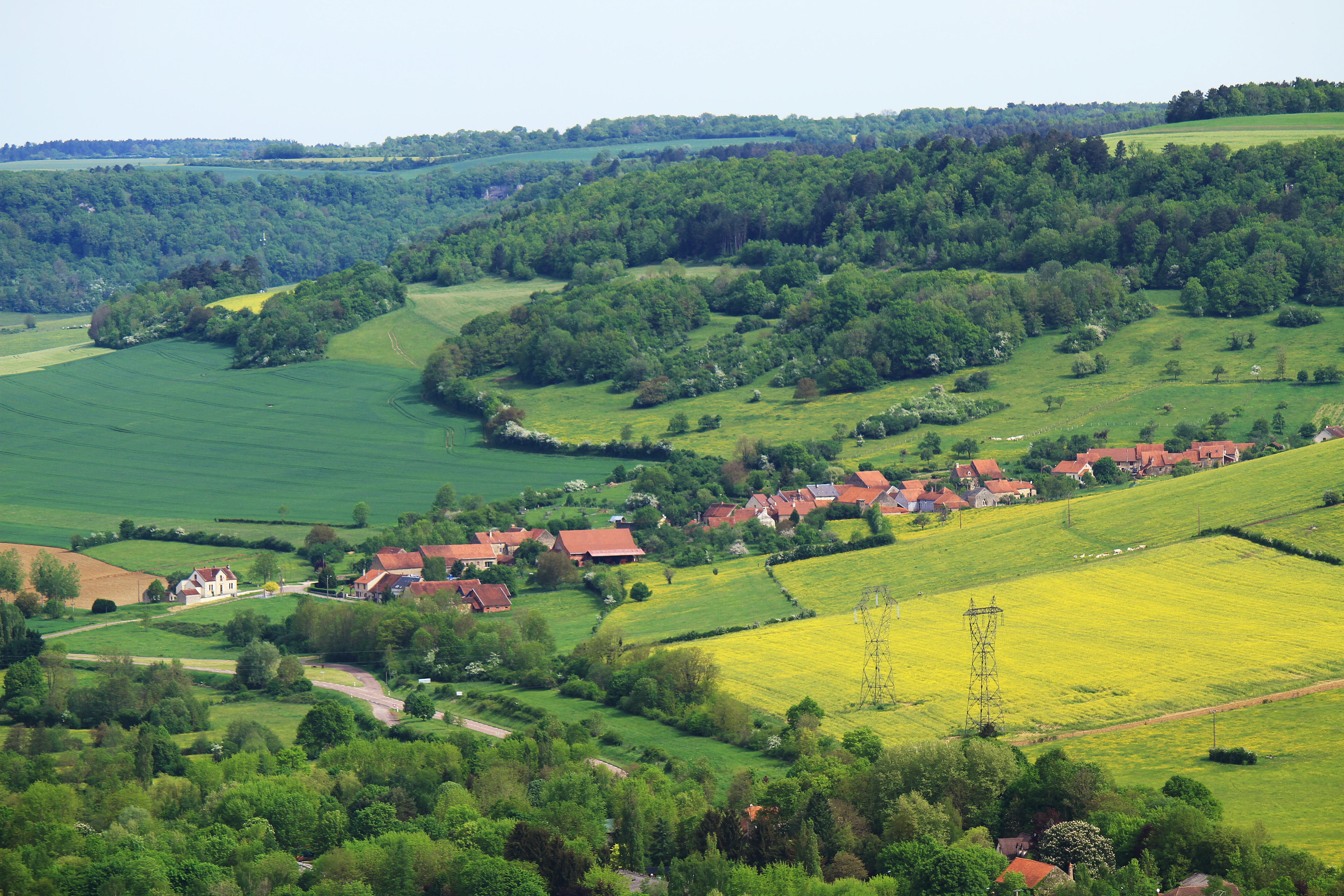 Brain vu de l'éperon barré d'Arnay-sous-Vitteaux